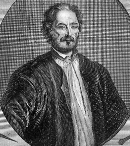 Porträt des Mörders Franz Laubler